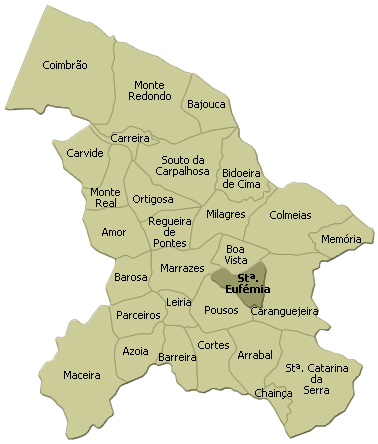 localisation de santa eufémia sur la freguesia de leiria